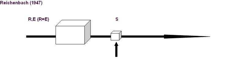 Tempussystem von Reichenbach, Zeitachse Vergangenheit E,R-S